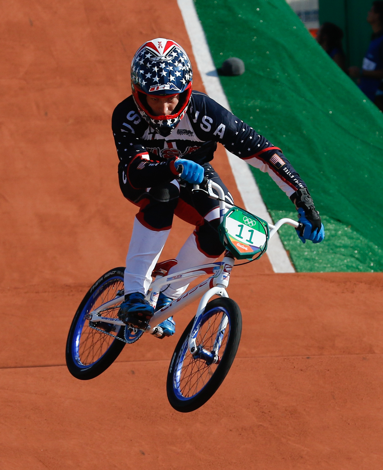 Rio de Janeiro - Ciclista norte-americano Connor Fields compete BMX nos Jogos Olímpicos Rio 2016, no Parque Radical em Deodoro (Fernando Frazão/Agência Brasil)